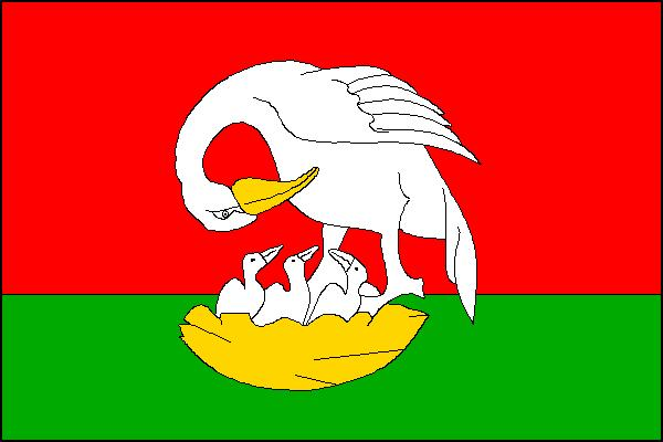 Vlajka obce Holetín